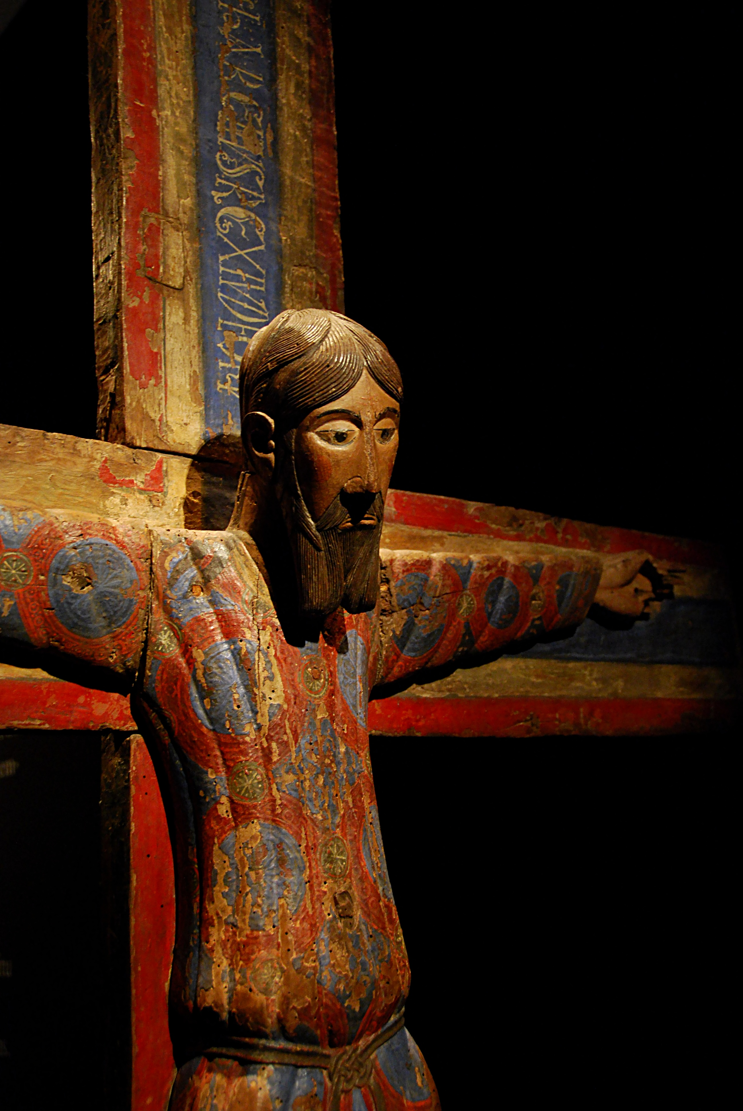 Majestat Batlló. Petita joia romànica. Mitjan segle XII. Talla en fusta de xiprer (Crist) i de castanyer (creu) policromada al tremp. Dins de l'exposició «El romànic i la mediterrània» del MNAC.